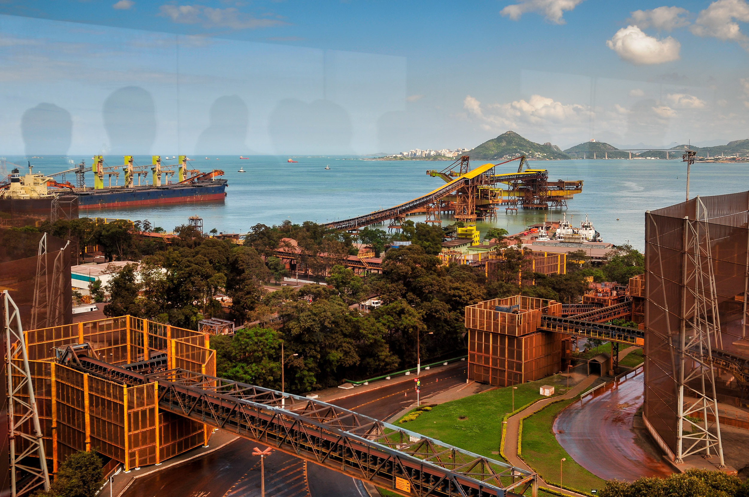 visita à vale do rio doce